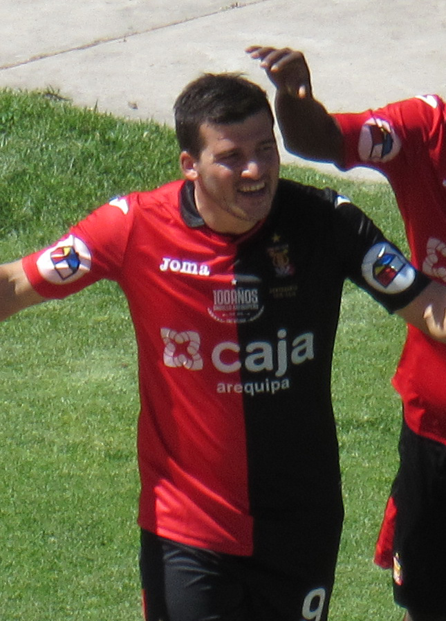 BernardoCuesta con el FBC Melgar del Perú